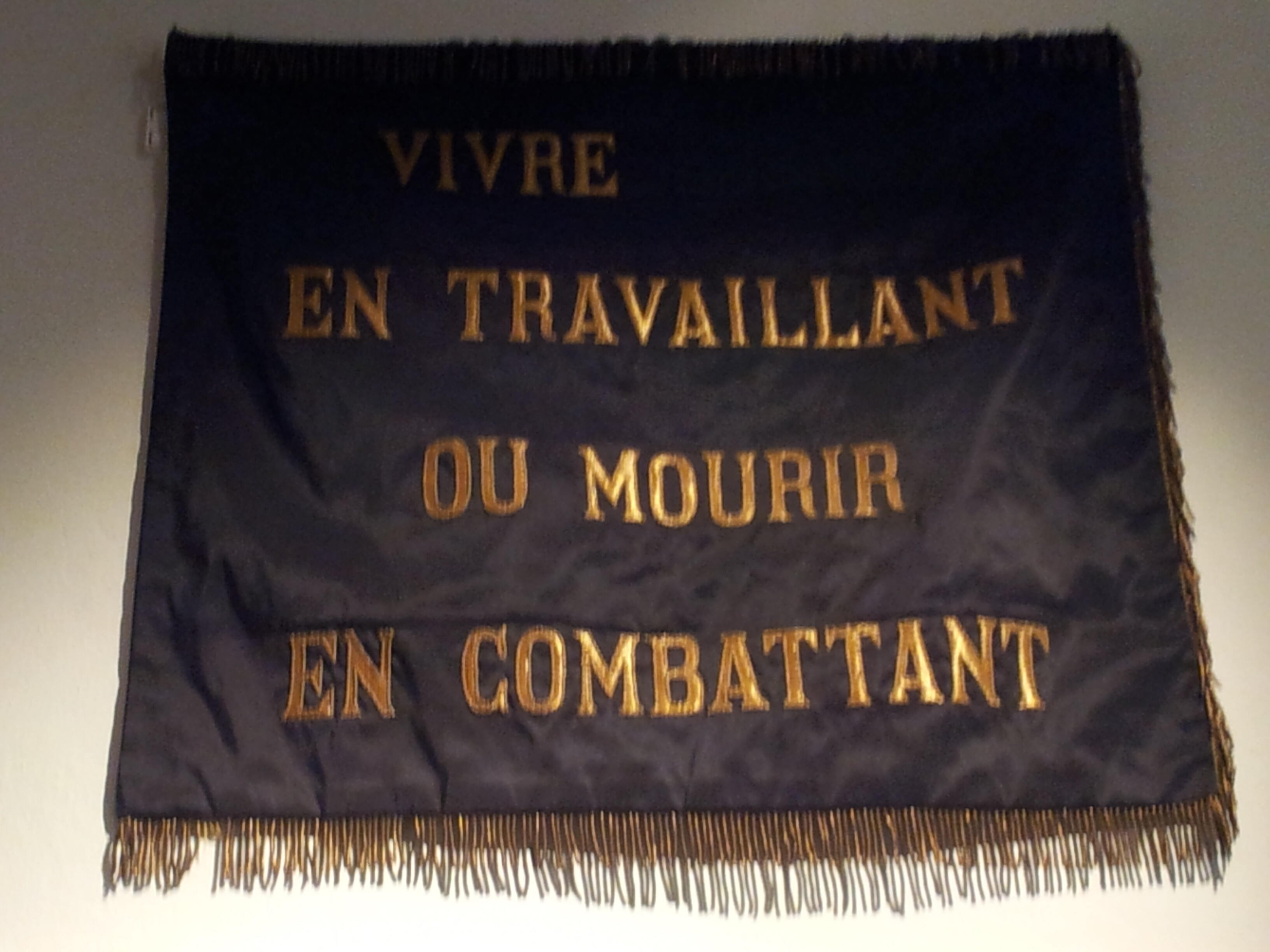 Fanion de la devise des canuts "Vivre en travaillant ou mourir en combattant" lors de leur révolte Pennant of the slogan of the silk workers